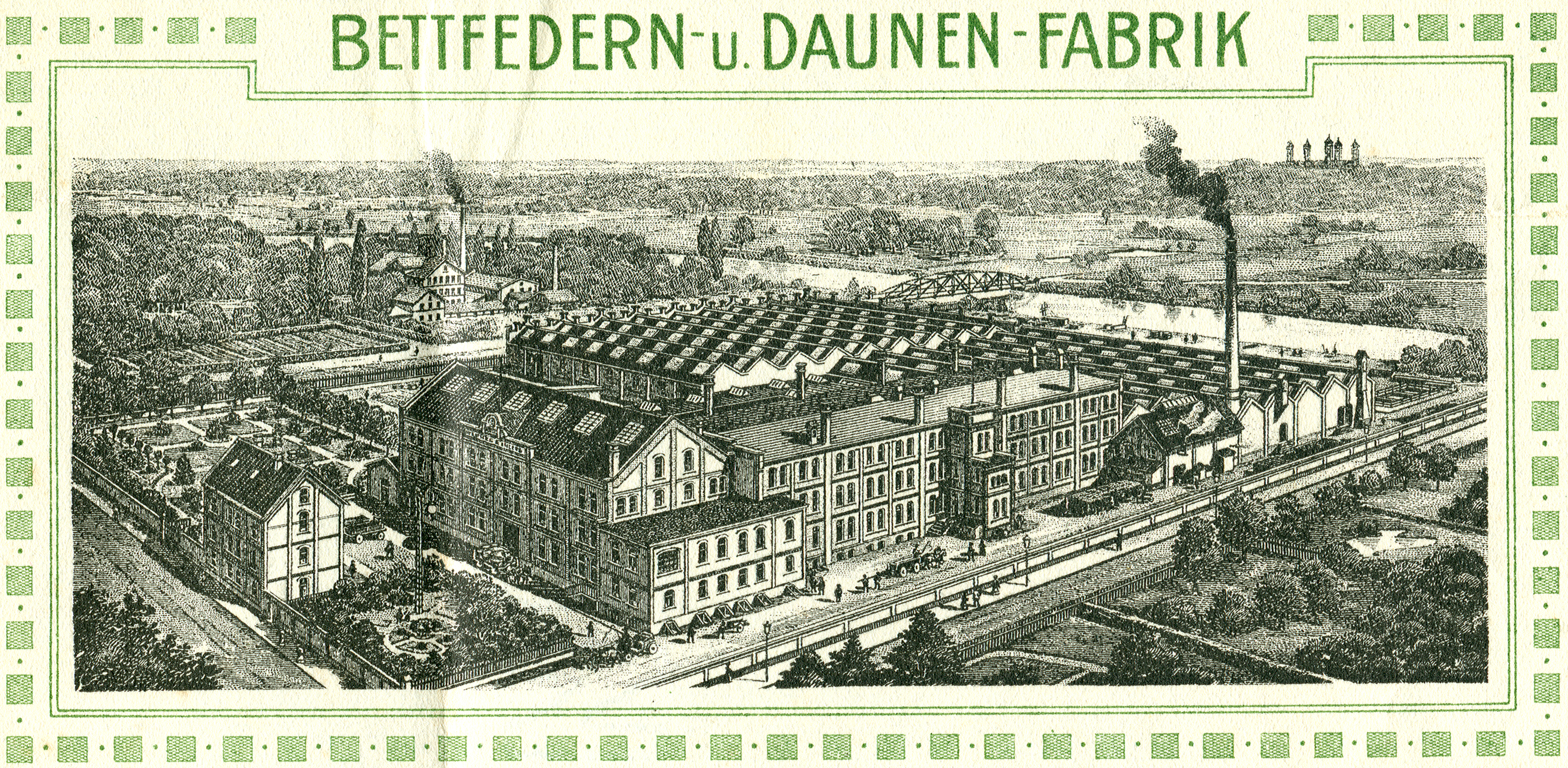 Elektronischer Ausschnitt aus einem Rechnungsvordruck von Werner & Ehlers, Bettfedern- und Daunen-Fabrik in Hannover-Linden-Nord. Der vermutlich um 1910 gefertigte Stich - es sind noch keine Automobile zu sehen - in der Mitte des Briefkopfes wurde von einem (noch nicht identifizierten) Stahlstecher gefertigt. Im Vergleich zu früheren Stichen der Firma ist eine vergrößerte Bebauung des heutigen Kulturzentrums Faust zu sehen, im Hintergrund eine einzelne Fabrik mit Wohngebäude auf dem Gelände der 1899 erbauten Grundschule Salzmannstraße am Pfarrlandplatz gegenüber der Brakebuschstraße, eine Stahlbogenbrücke über die Leine, und im Hintergrund das Welfenschloss, heute die Gottfried Wilhelm Leibniz Universität Hannover. Das vollständige Blatt, etwas größer als DIN A4 mit dem Wasserzeichen Manila Schreibmaschine(n) wurde noch 1935 als Rechnung an Jos. Tolle in Hachen in Nordrhein-Westfalen versandt ...